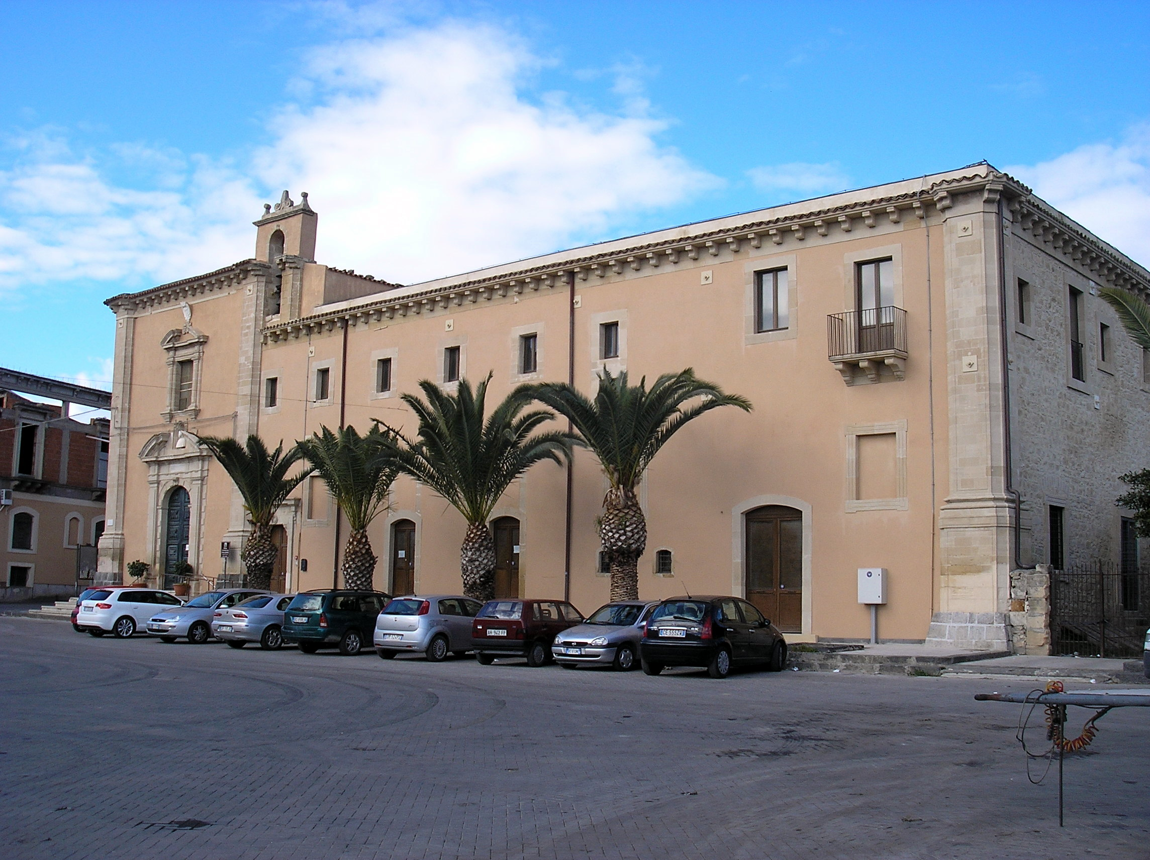 La chiesa di Sant'Antonio e il convento dei frati francescani riformati, edificio barocco del 1644 a Scordia (CT)